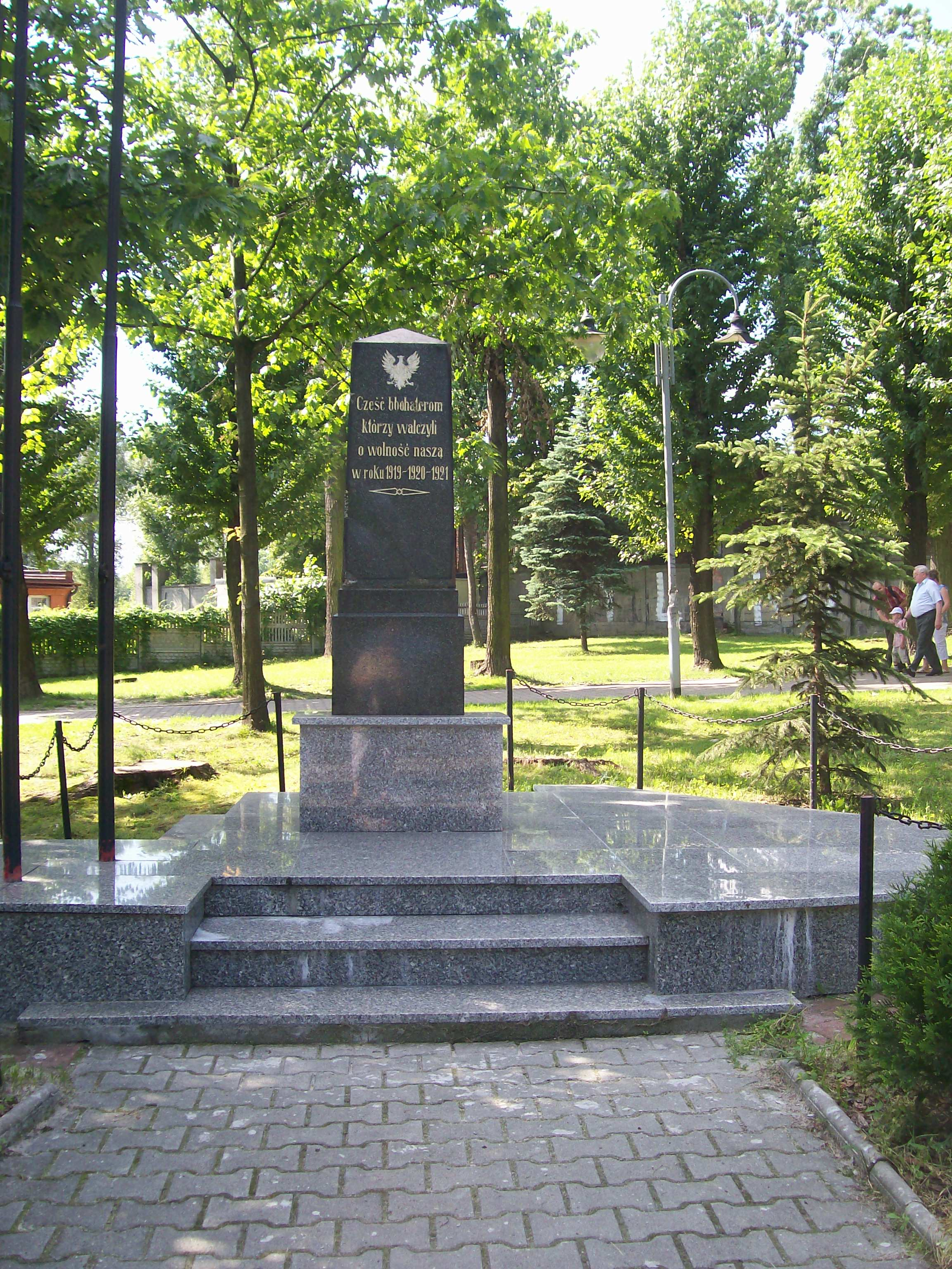 Nikiszowiec